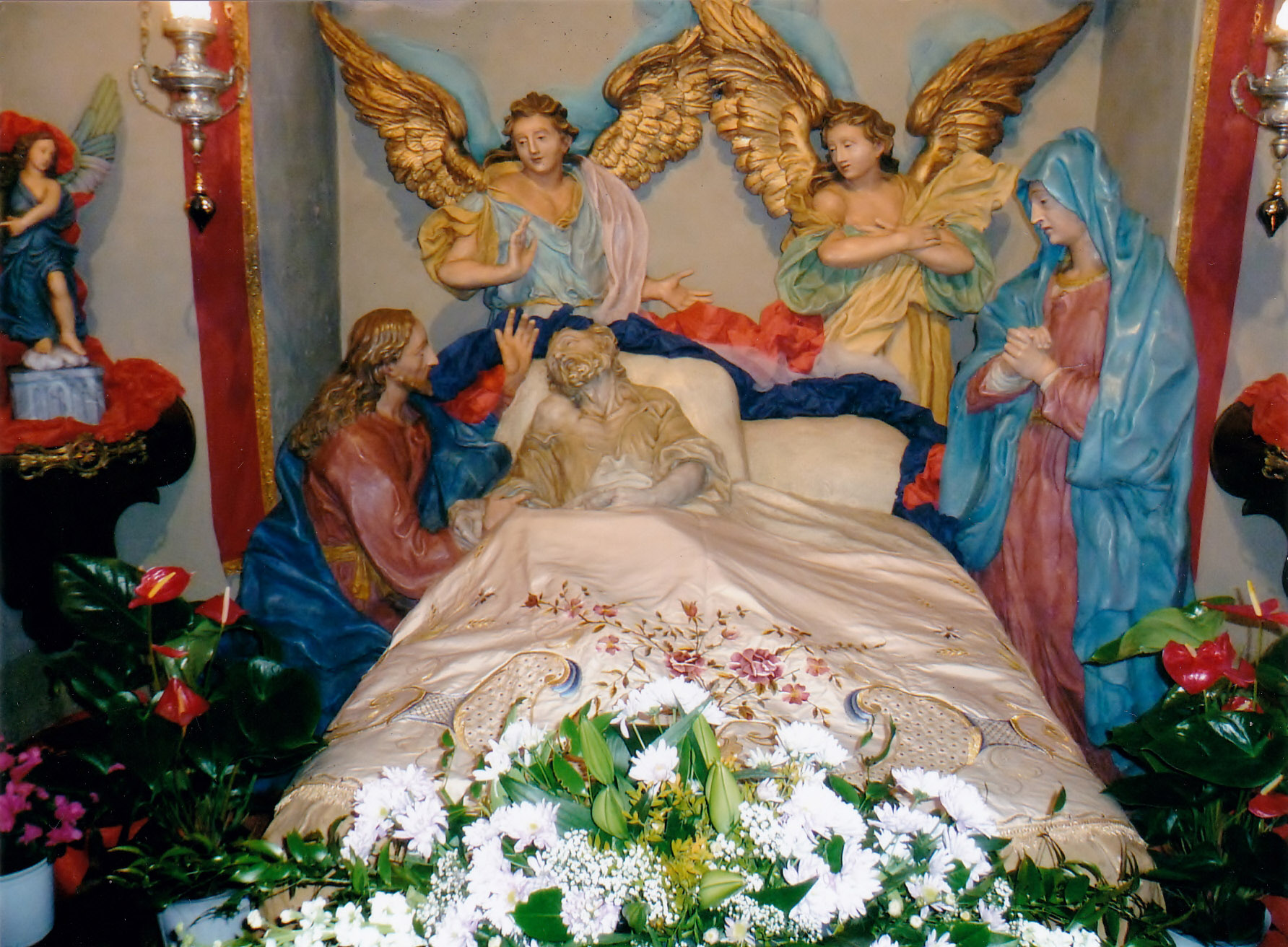 La scena rappresenta la morte di San Giuseppe